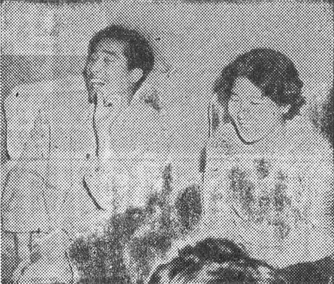 대검찰청 오제도 검사실에서 기자회견 중인 대한민국의 소설가 박노문, 소설가 겸 작가 허근욱 부부. 독립운동가 겸 여성 해방 운동가 허정숙의 이복 여동생과 이복 제부이다.